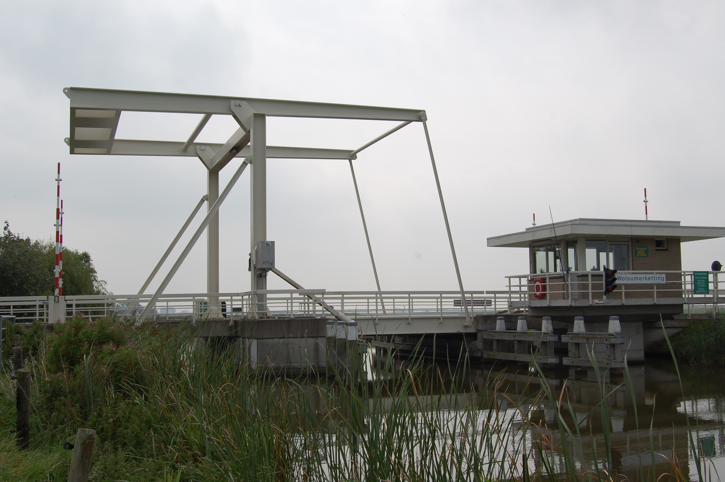 De brug bij Wolsumerketting over de Wimerts